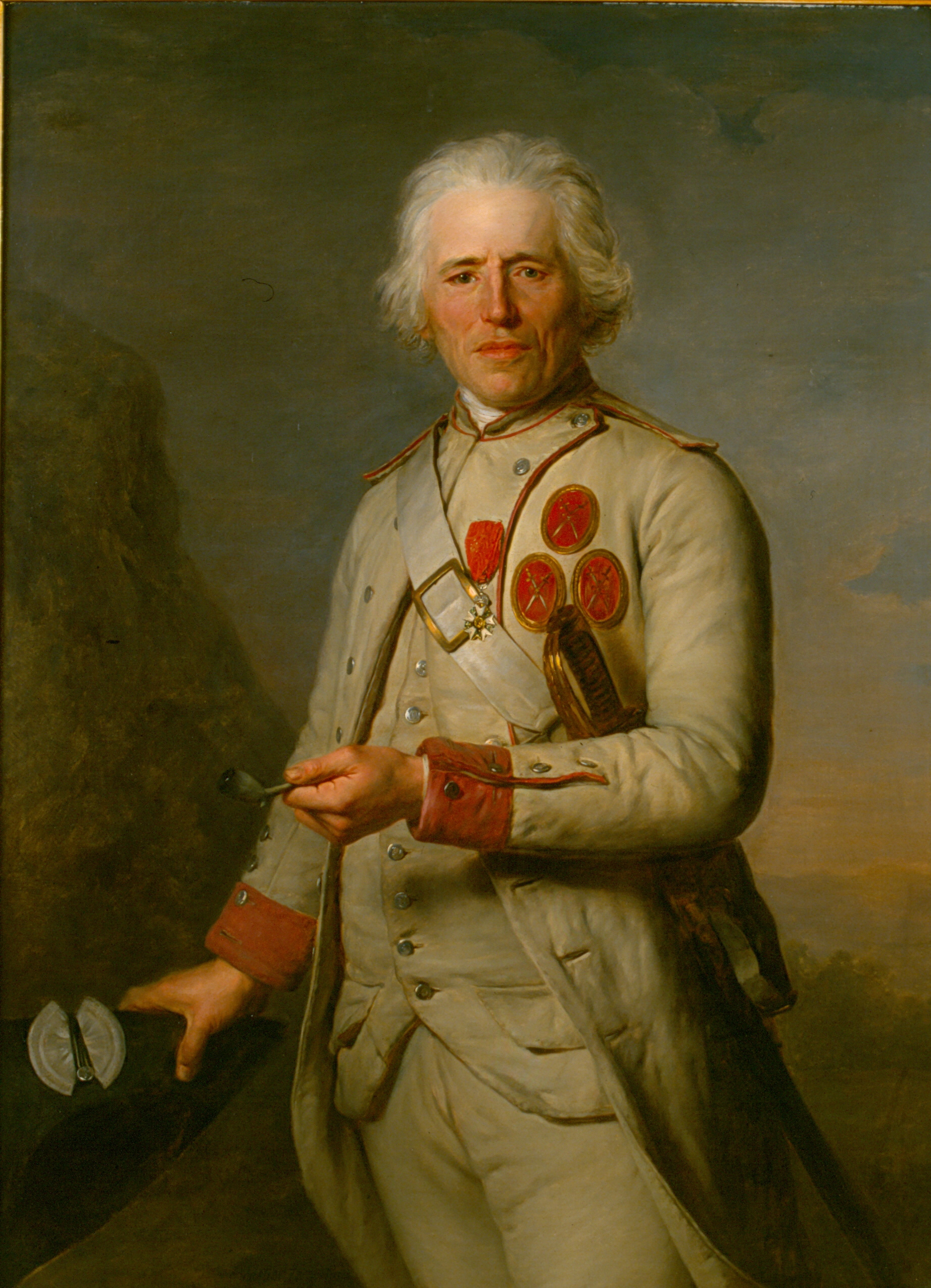 Der Militärveteran Jean Thurel (1699-1807)